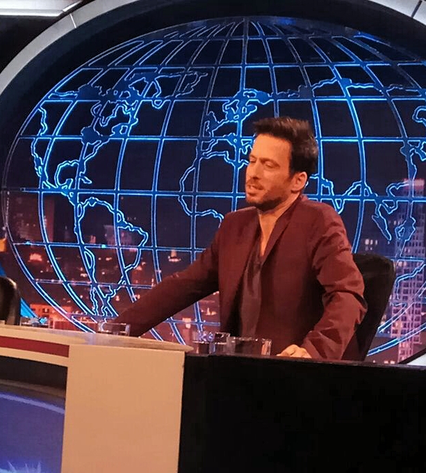 עידו רוזנבלום בגב האומה, יוני 2017